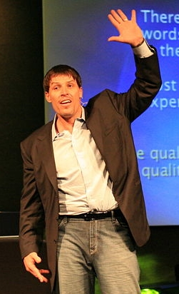 Author, life coach, and motivational speaker Tony Robbins.